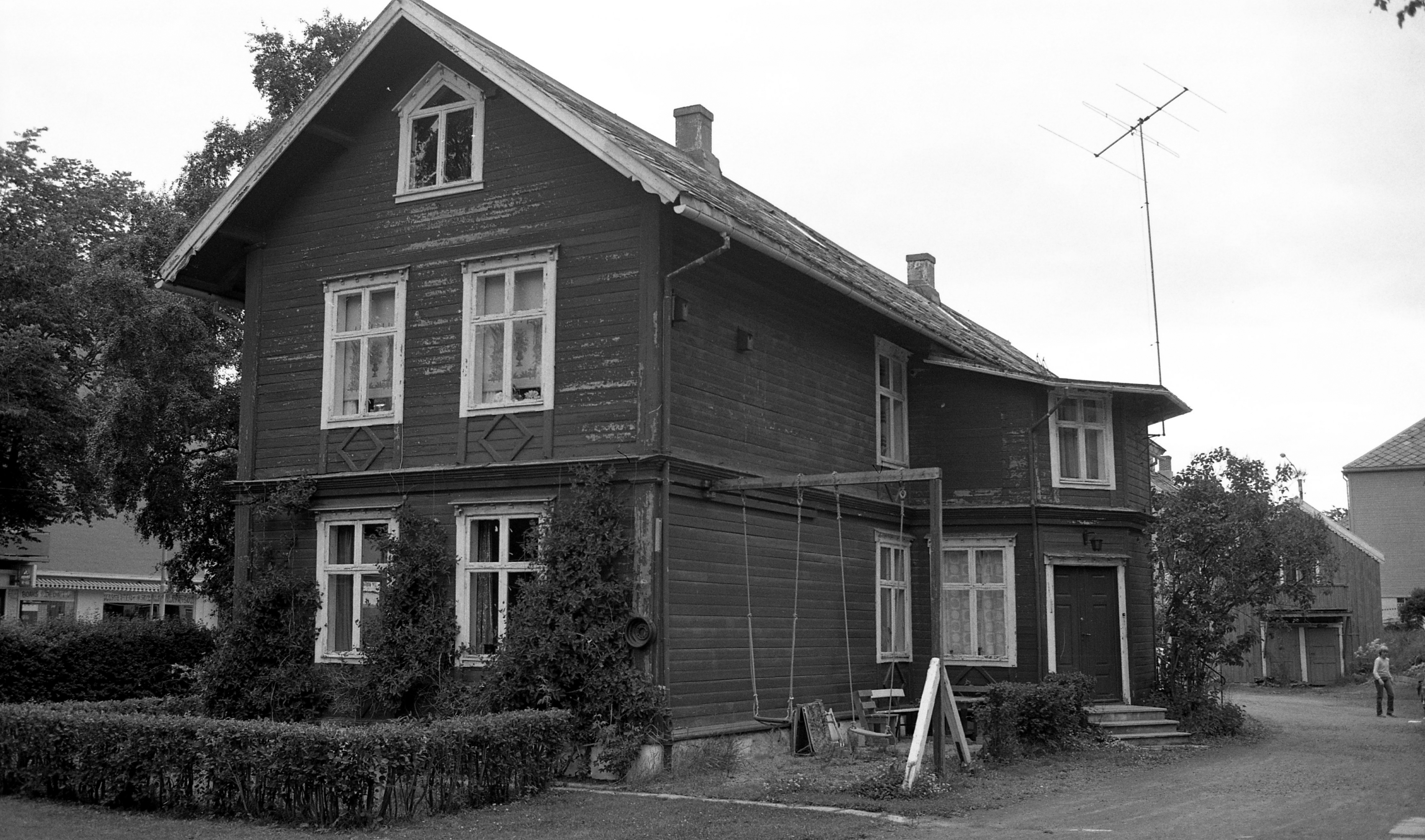 Landstedet Rosendal var opprinnelig en parsell av Voldsminde som ble fradelt 1875 og solgt til handelsmann G. F. Prydz. Fra 1876 eide oberstløytnant Tyrholm stedet, og i 1891 kjøpte organist Jørgen N. Brønner gården. Kilde: Trondheim Byleksikon. Foto: Byantikvaren, fotograf Morten Kerr. Format: Negativ. Bilde tatt: Juli 1982(?) Film 225, negativ 3.